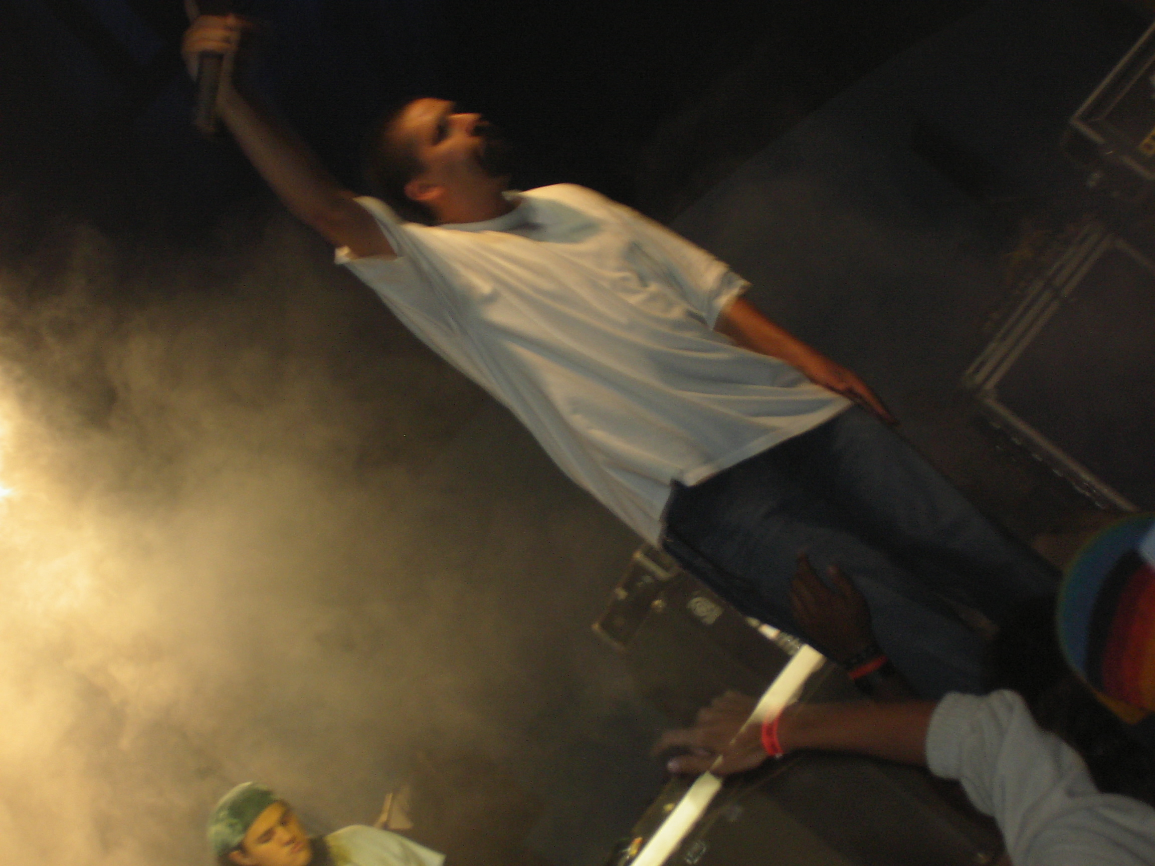 Una presencia escenica impresionante, sus letras tienen mensajes fuertes, directos e indiluídos. Es dificil creer que es el mismo de Control Machete, el si se tomó en serio lo de "nueva criatura"